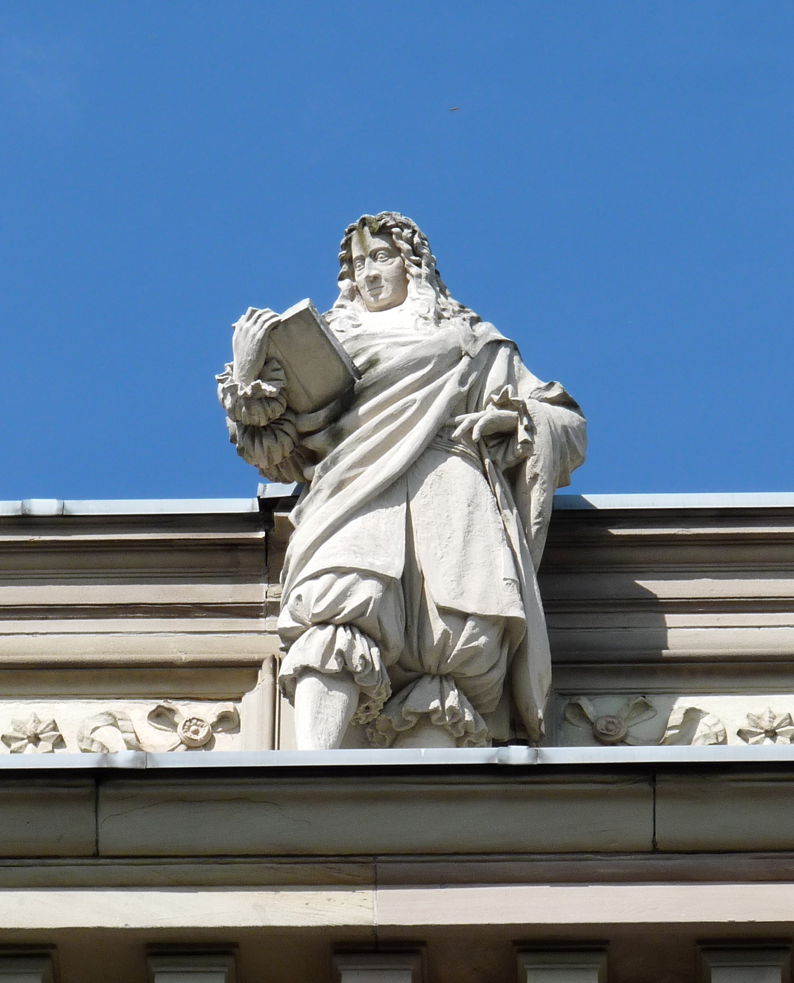 Statue de Samuel von Pufendorf sur la corniche du Palais Universitaire de Strasbourg